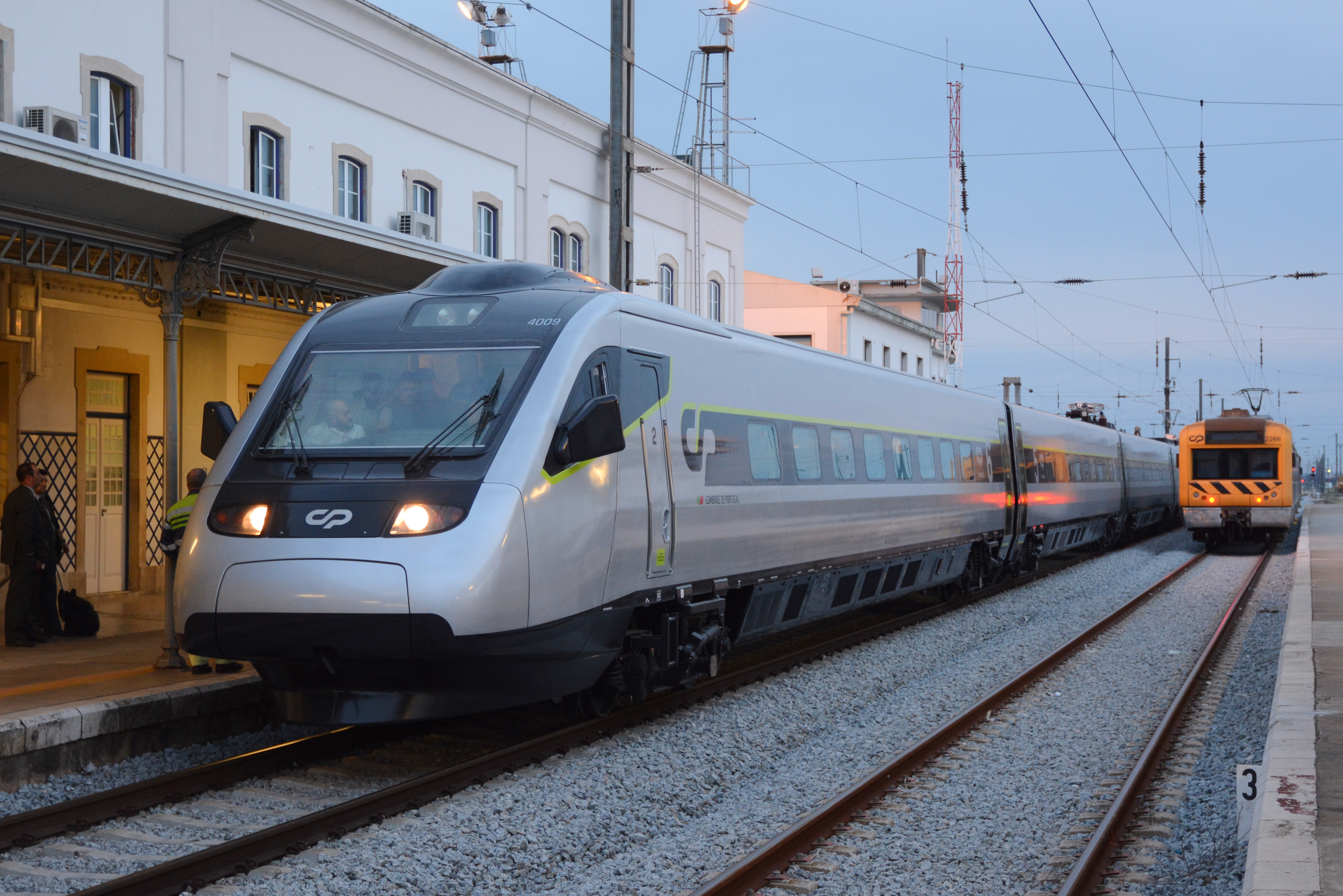 O CPA 4009 em ensaios entre o Entroncamento e Pombal, já com a nova imagem. Fotografia de Valério dos Santos.